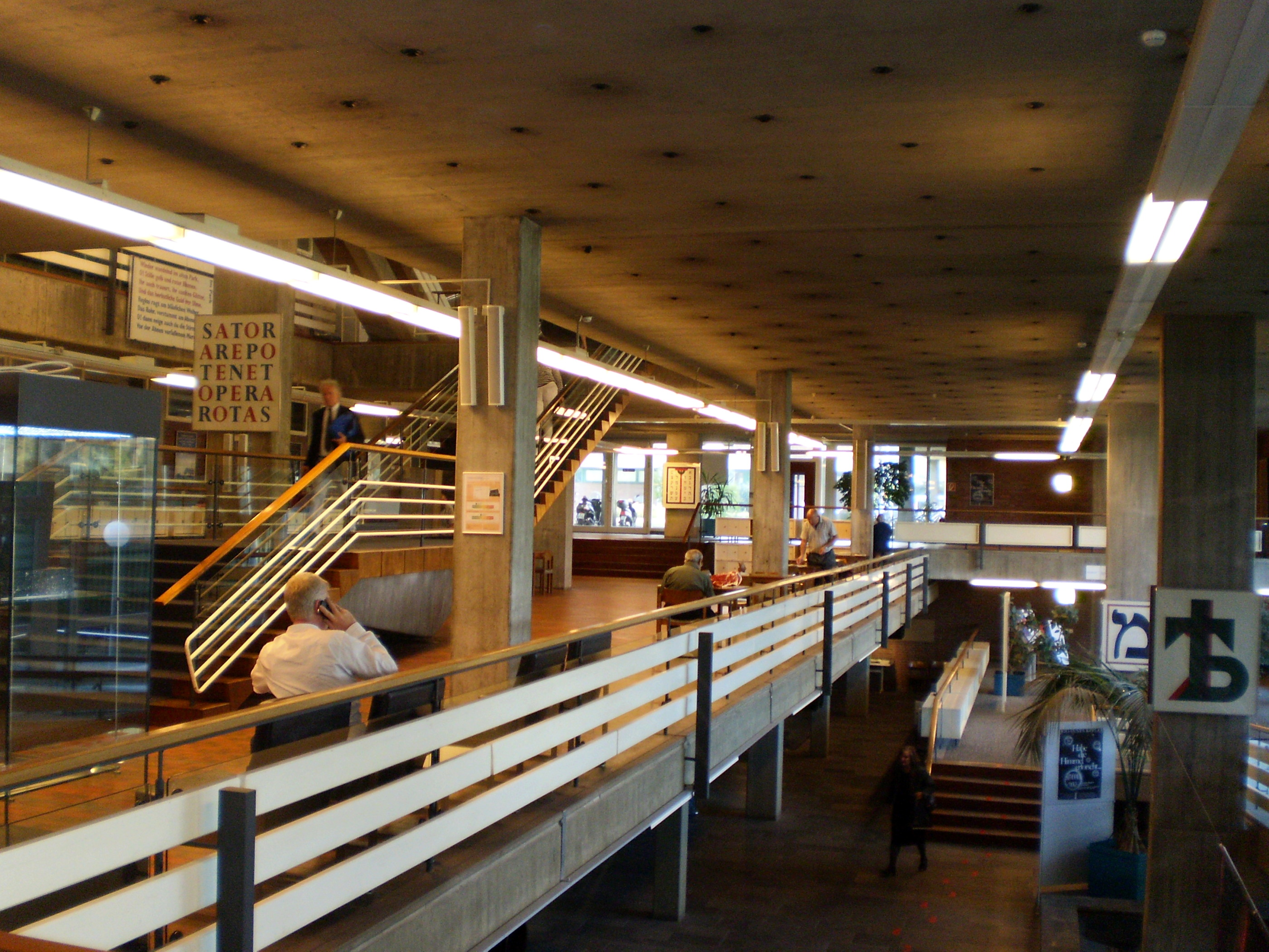 Inside the Württembergische Landesbibliothek Mit fünf „Schrift-Bildern“ von Josua Reichert, von links nach rechts: „Wieder wandelnd im alten Park“, Gedicht von Georg Trakl „Im Park“, Werkverzeichnis Josua Reichert: SB 27. „SATOR AREPO TENET OPERA ROTAS“, Antikes Palindrom, Werkverzeichnis Josua Reichert: SB 14. Hebräisches Alphabet, Werkverzeichnis Josua Reichert: SB 7. Hebräischer Buchstabe Mem, Werkverzeichnis Josua Reichert: SB 1. Kyrillischer Buchstabe Jat, Werkverzeichnis Josua Reichert: SB 5. Werkverzeichnis Josua Reichert: Josua Reichert; Waltraud Pfäfflin (Bearbeiter); Klaus Maurice (Bearbeiterin): Josua Reichert, Werkverzeichnis 1959 - 1995 : mit Anmerkungen des Künstlers zu seinen Werkgruppen. Ostfildern-Ruit 1997.